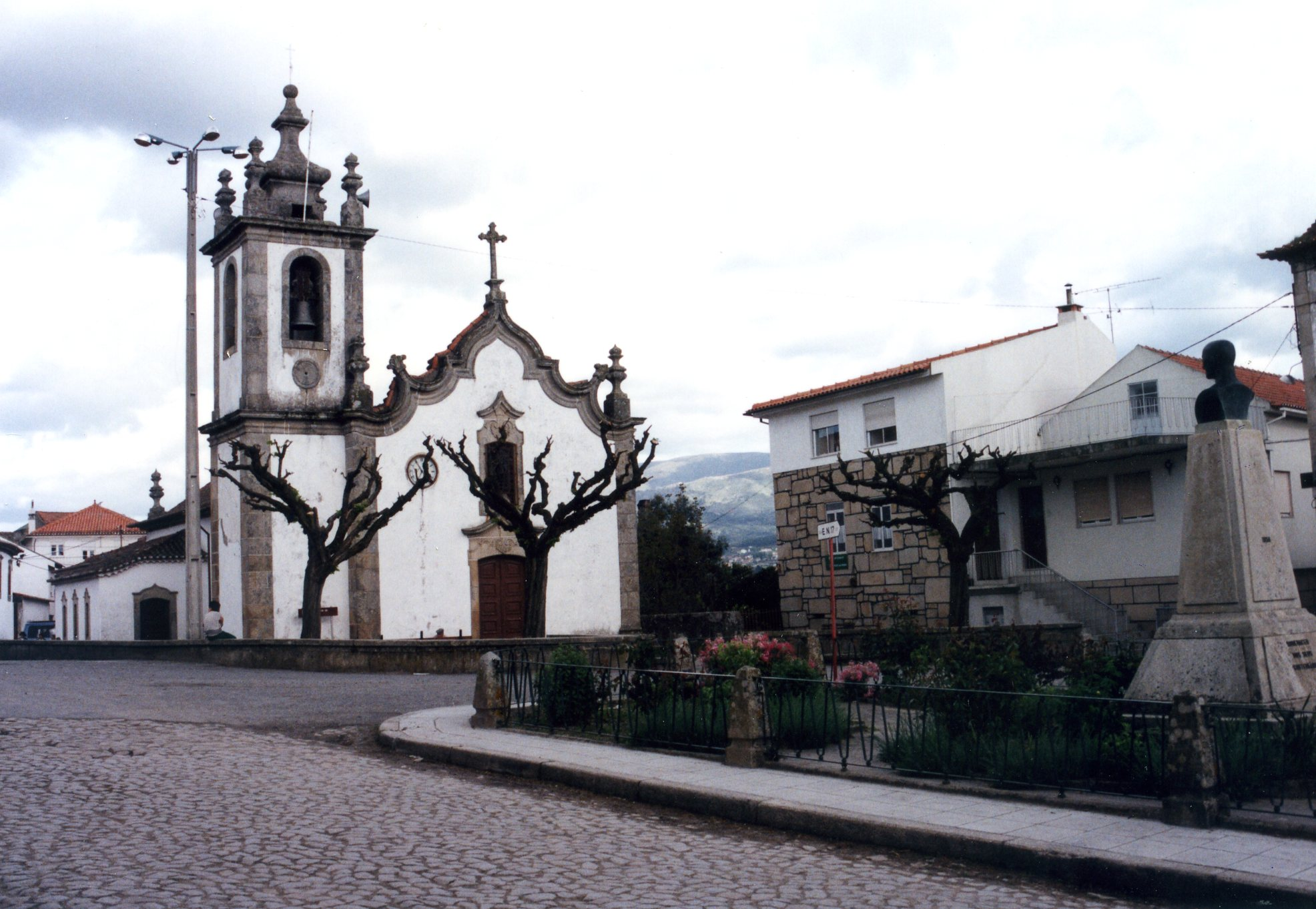 Igreja Matriz de Pinhanços / Igreja de Santa Luzia This file was uploaded for Wiki Loves Monuments in Portugal with the unique identifier 97016009.